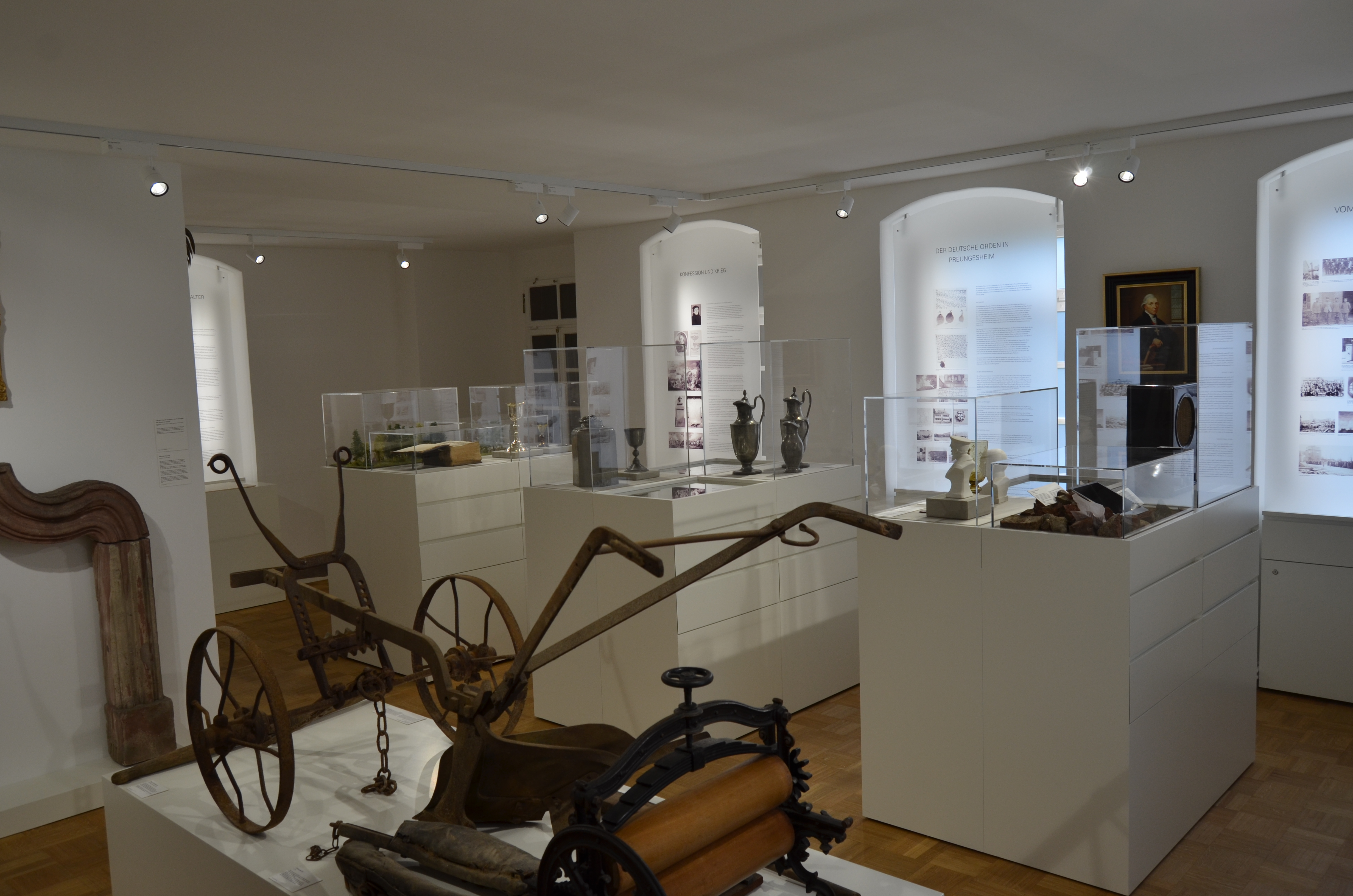 Museum an der Kreuzkirche